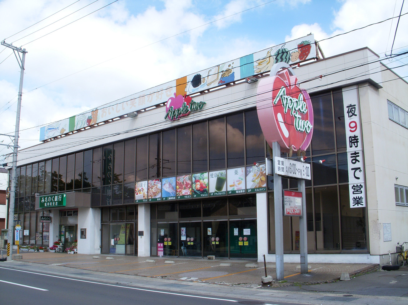 弘前市亀甲町